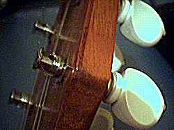 Gros plan de la tête d'un ukulélé à clefs à friction